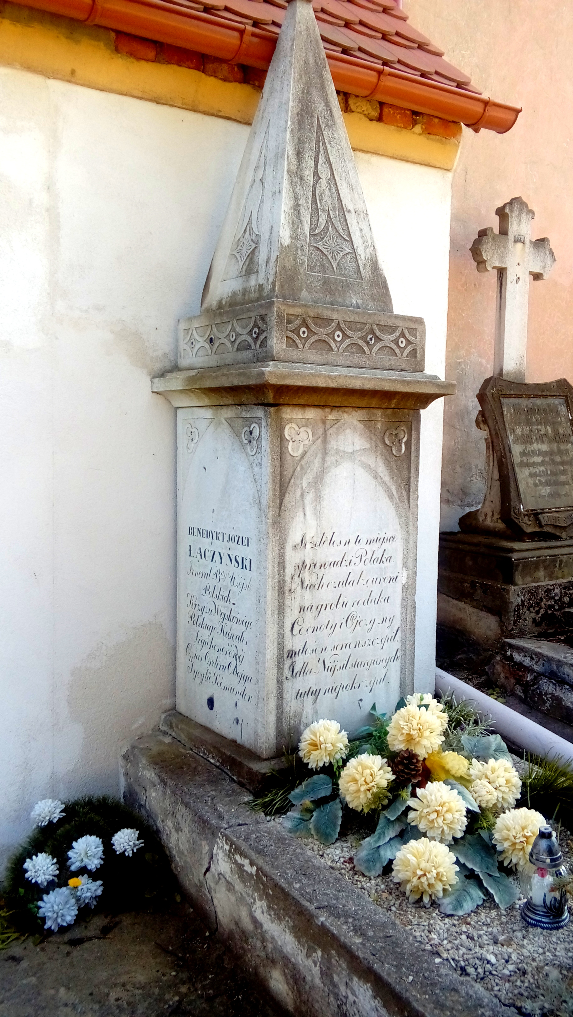 Wałbrzych-Szczawienko, grób generała Józefa Benedykta Łączyńskiego na cmentarzu parafialnym przy kościele św. Anny